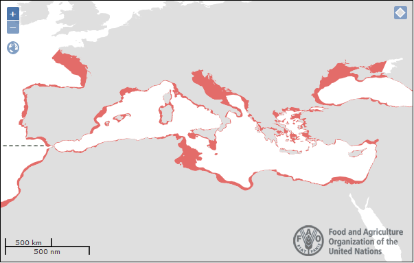 Das Bild zeigt das Verbreitungsgebiet von Trachurus mediterraneus